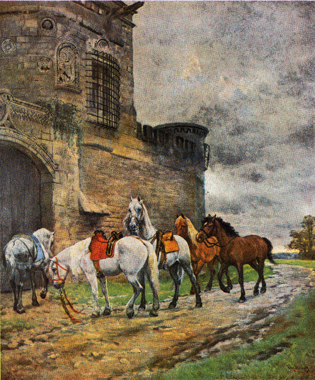 représentant des chevaux devant l'hôtel des Gens d'armes à Caen (Calvados, France).